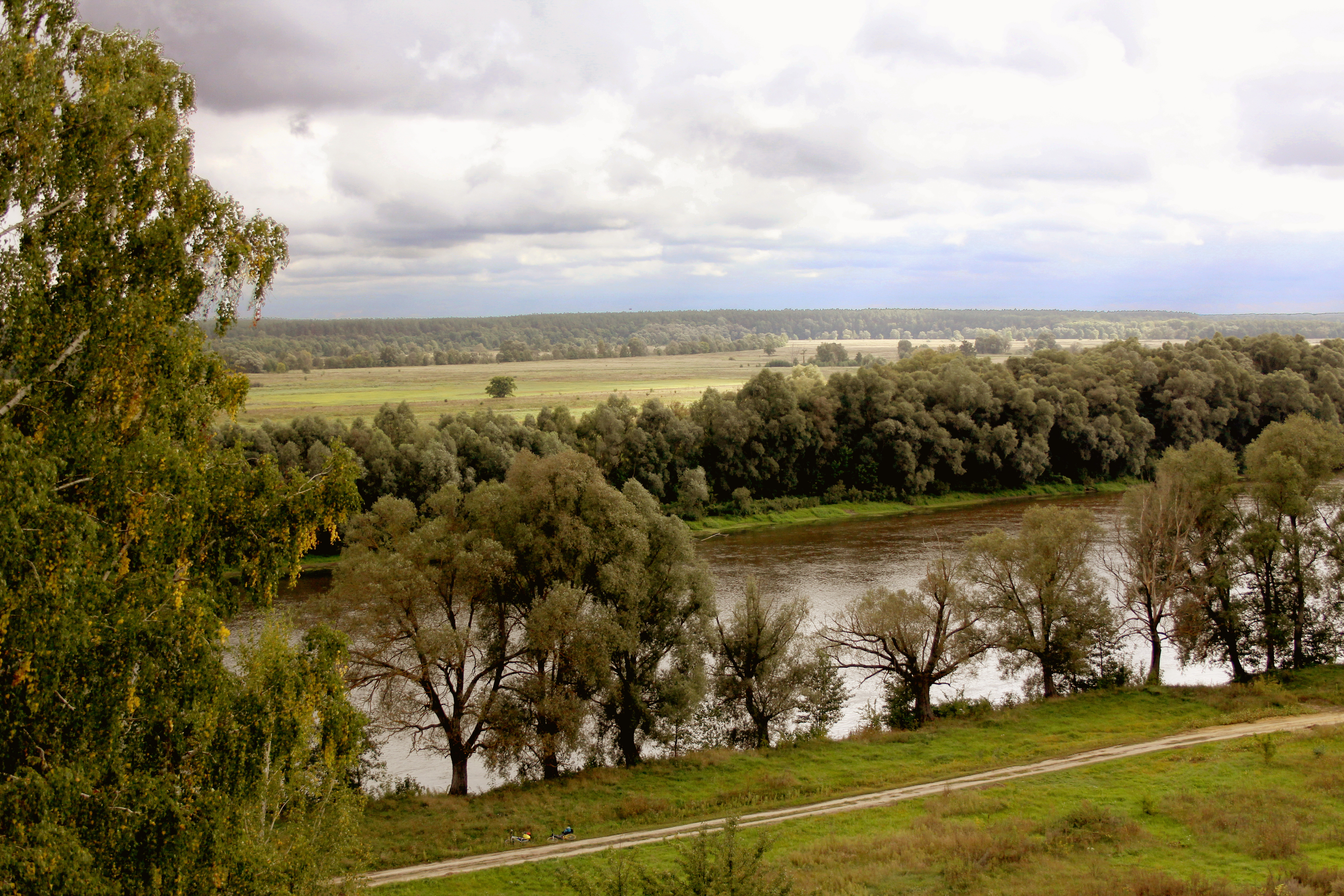 Мезинський національний природний парк, Коропський район